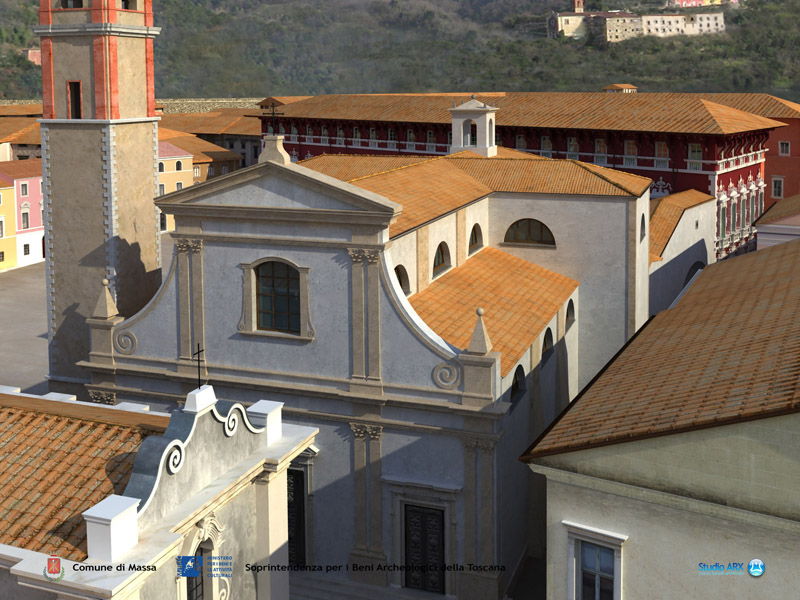 Rendering visto dall'alto della chiesa di San Pietro e San Sebastiano di Massa come potevano risultare intorno al 1790